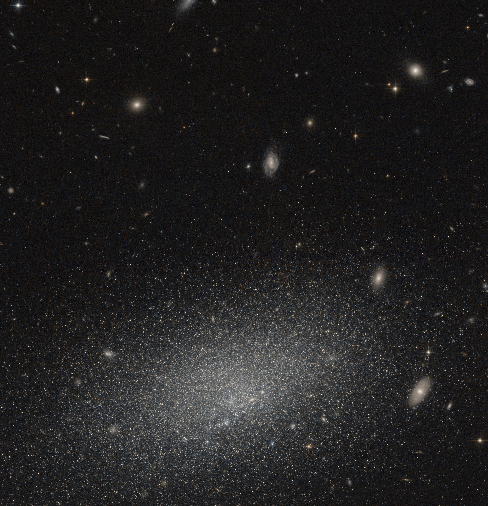 UGC 4879